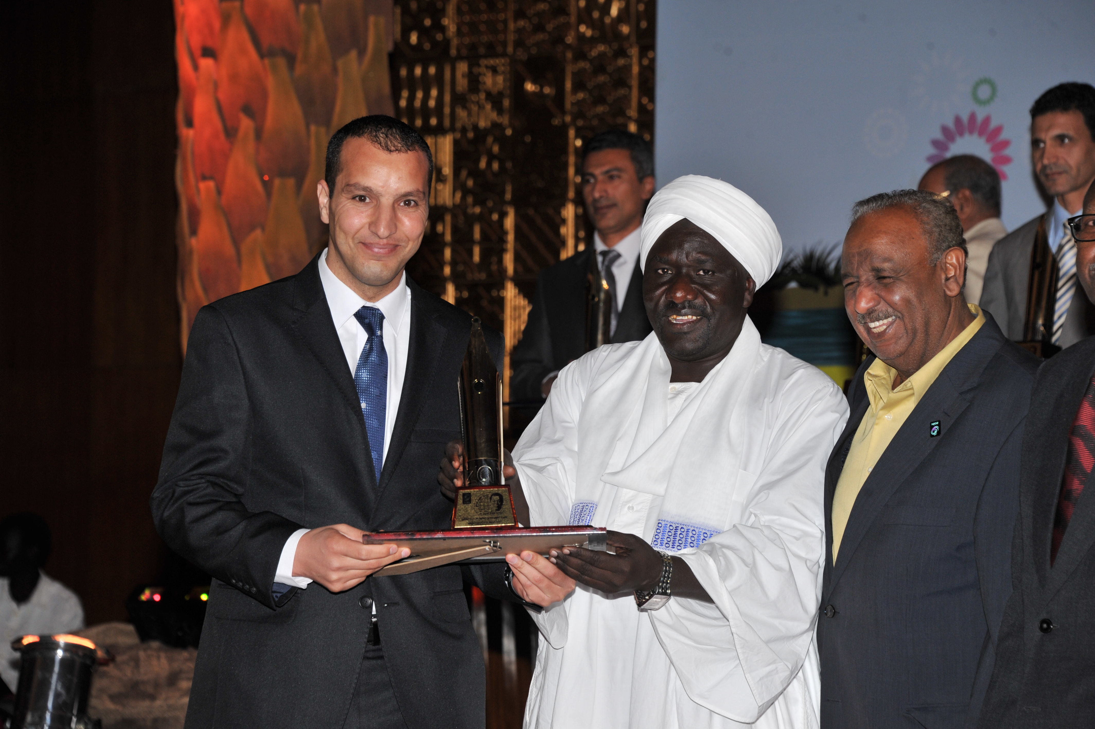 التتويج بجائزة الطيب صالح العالمية للإبداع الكتابي